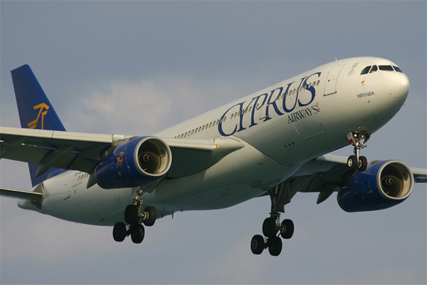 Airbus A330 der Cyprus Airways kurz vor der Landung am internationalen Flughafen von Larnaka